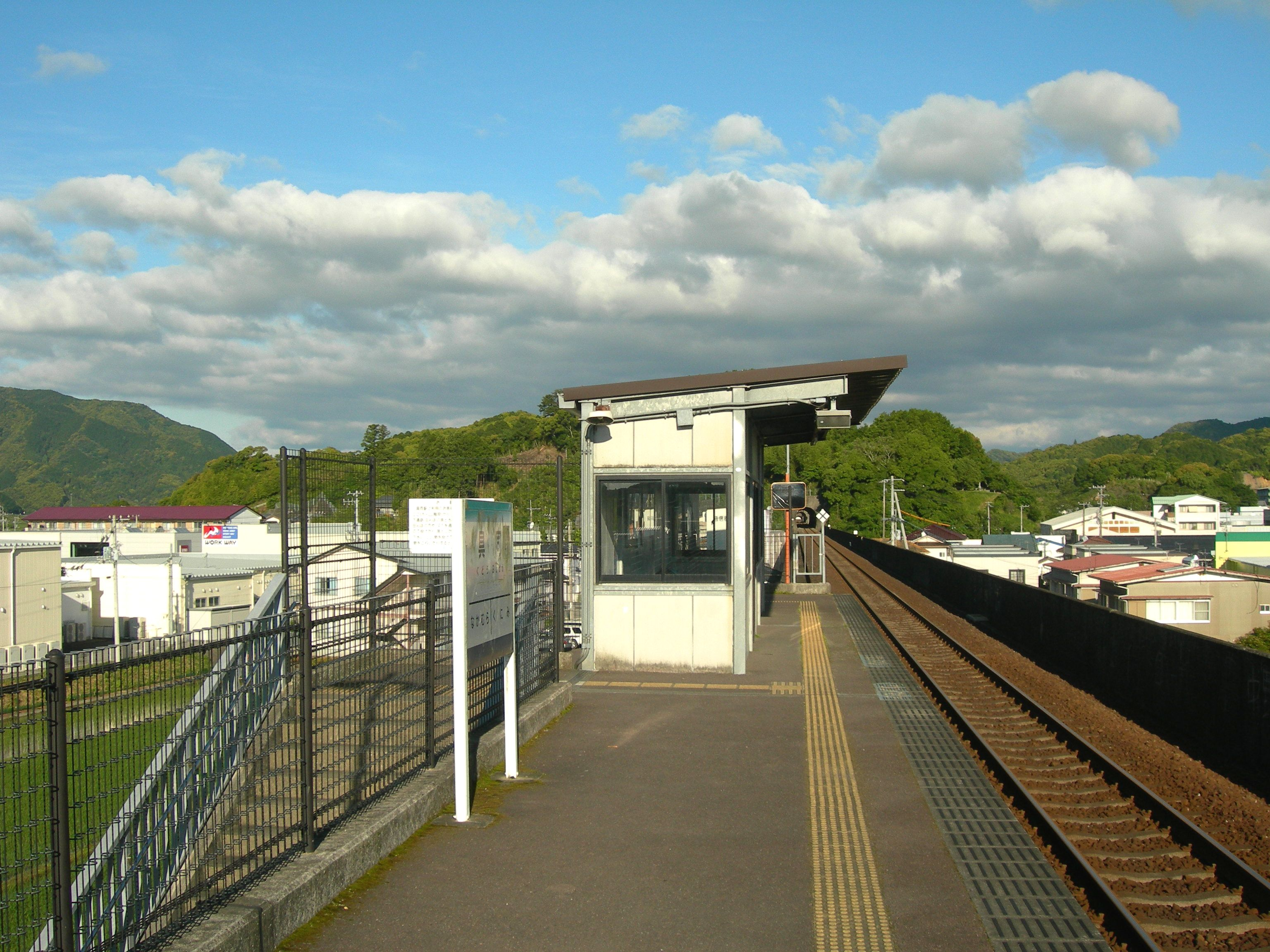 具同駅ホーム